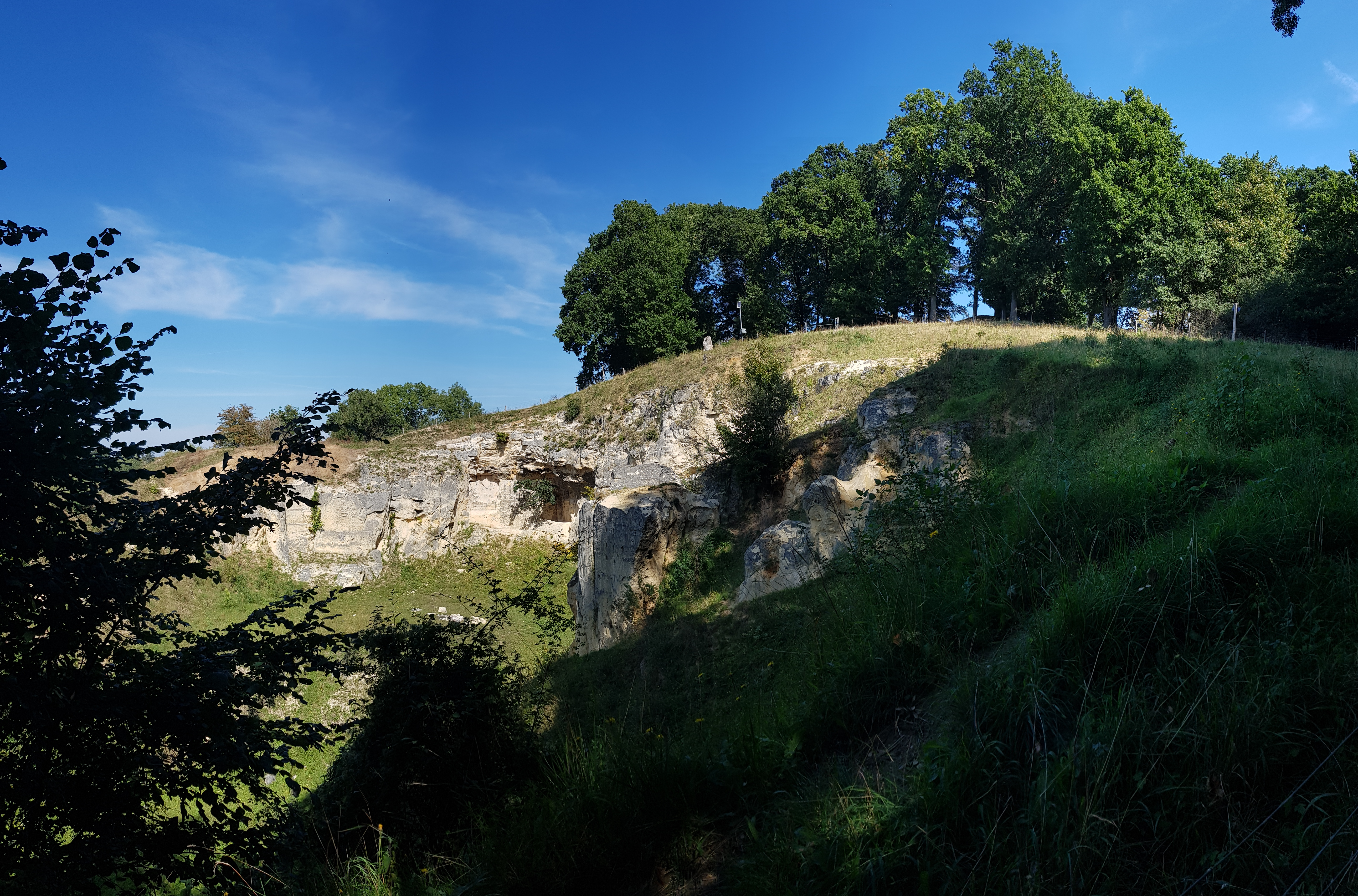 Groeve de Tombe, Maastricht, Nederland